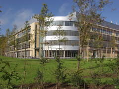 Biomedizinsiches Forschungszentrum der Uni Marburg